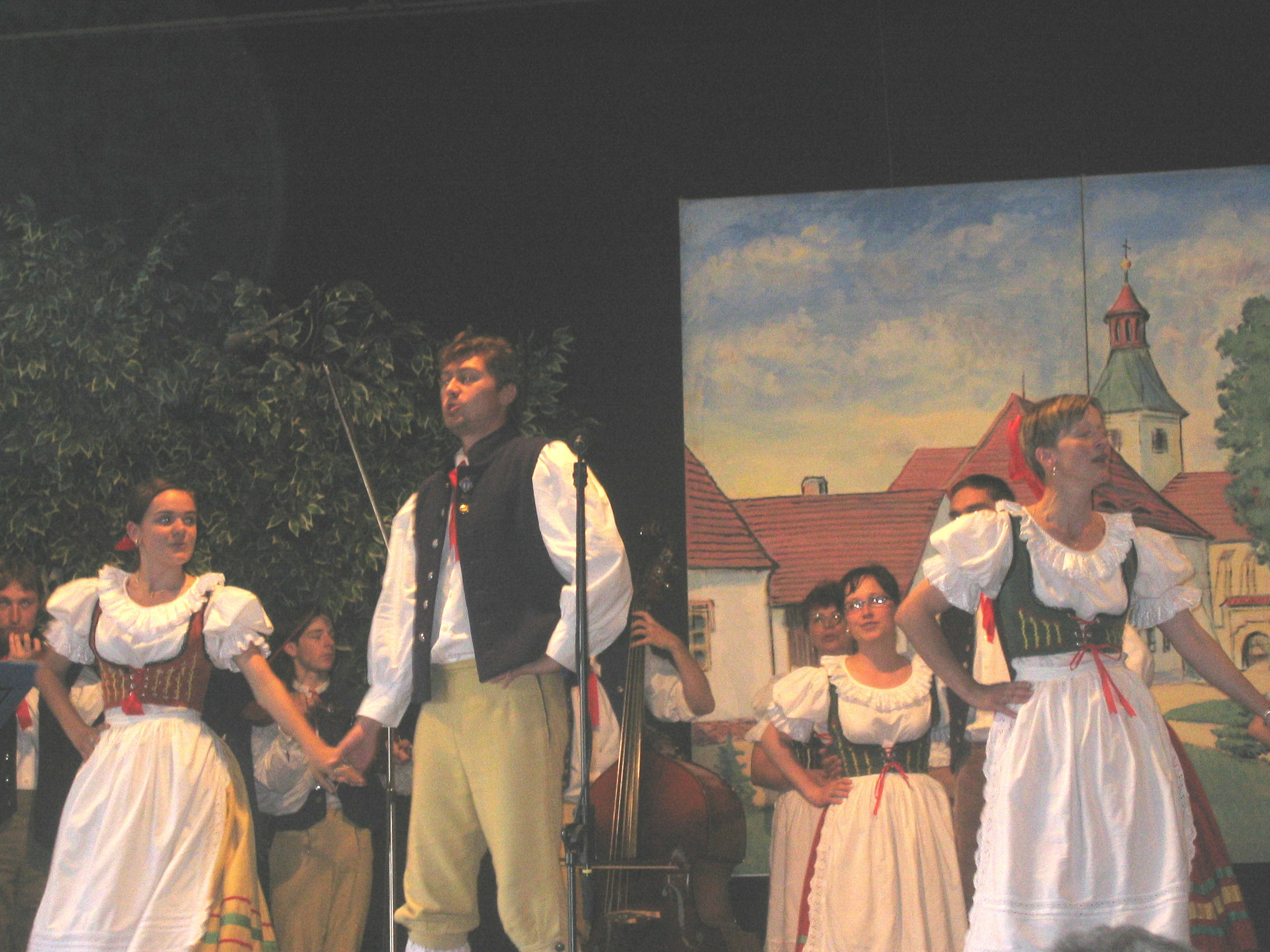 folklora ensemblo Písečan el la urbo Písek dum la Sudbohemia folklora festivalo en Kovářov en 2005 Kategorio:Bildoj de Ĉeĥio